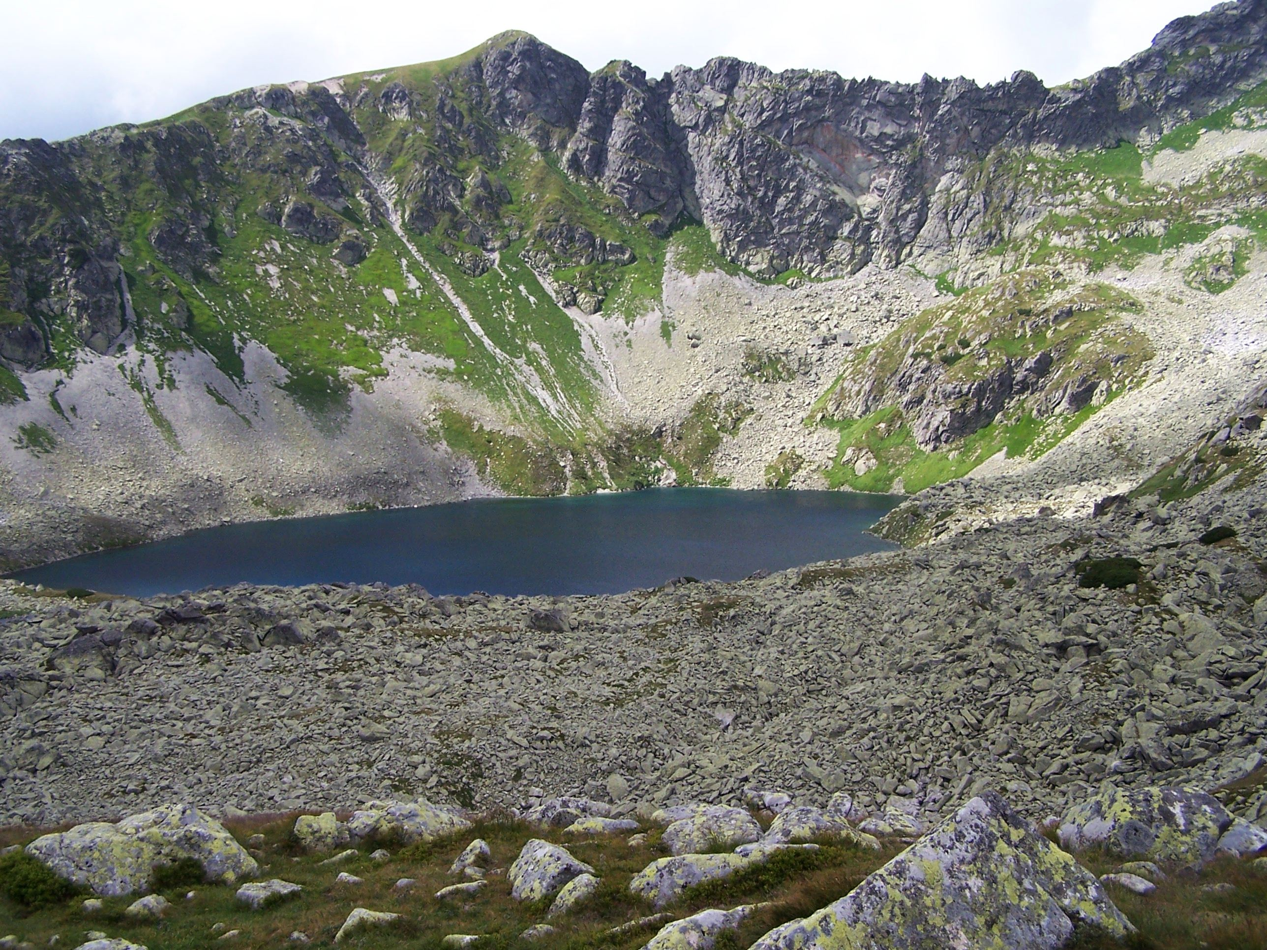 Zadni Staw Polski (Dolina 5 Stawów Polskich)